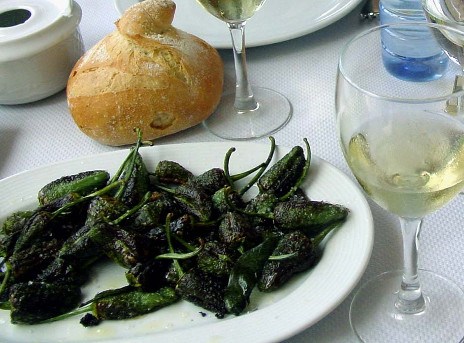 Pementos de Padrón, pan e viño galegos